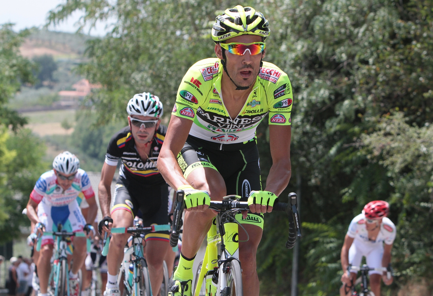 Alessandro Proni in azione